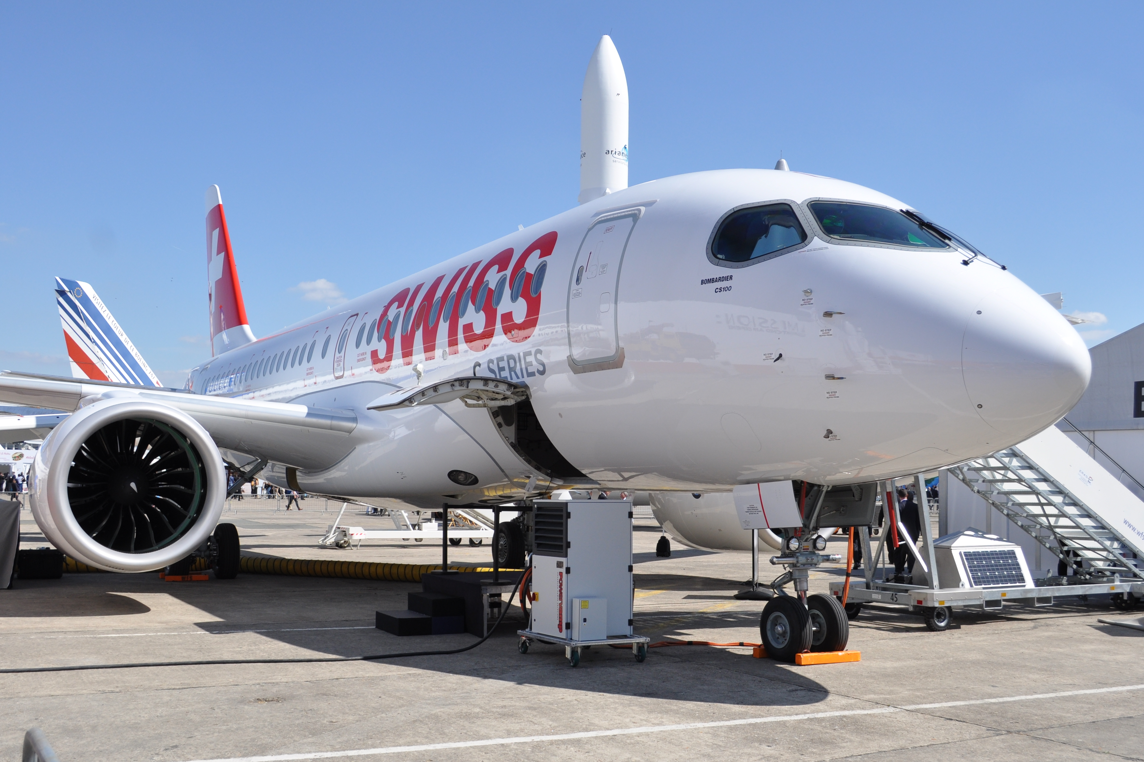 MSN 50005 Bombardier BD-500-1A10 CS100 BOMBARDIER AEROSPACE / SWISS COLORS LBG AIRPORT SIAE 2015